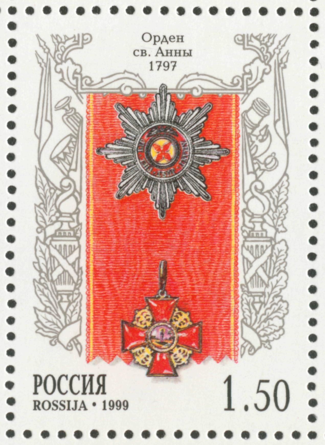 Ордена Российской Империи. Орден святой Анны. Из малого марочного листа России из пяти марок 1999 года.